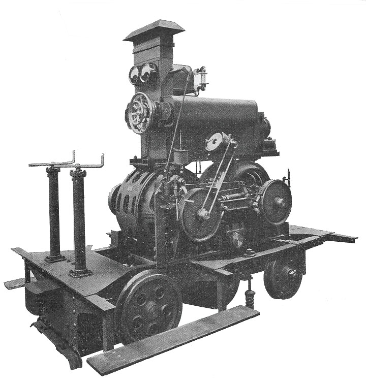 Innenleben einer Zahnradbahn-Lokomotive der Brunnen-Morschach-Bahn. Blick von der Talseite. Das Antriebszahnrad befand zwischen den beiden Laufachsen der Lokomotive und wurde von zwei Drehstrommotoren angetrieben. Die Motoren hatten eine Leistung von je 100 PS. Die beiden Spindeln-Handbremsen wirken auf Rillenbremsscheiben die auf das Bremszanhrad auf der talseitigen Achse wirkten. Auf jeder Motorwellen ist eine Bandbremsscheibe angebracht, auf die eine Federspeicherbremse wirkte, die vom Lokführer oder vom Zugspersonal auf dem Vorstellwagen betätigt werden konnte. An der Motorwelle links auf dem Bild ist der V-Messer mit der Übergeschwindigkeitsüberwachung angebracht.